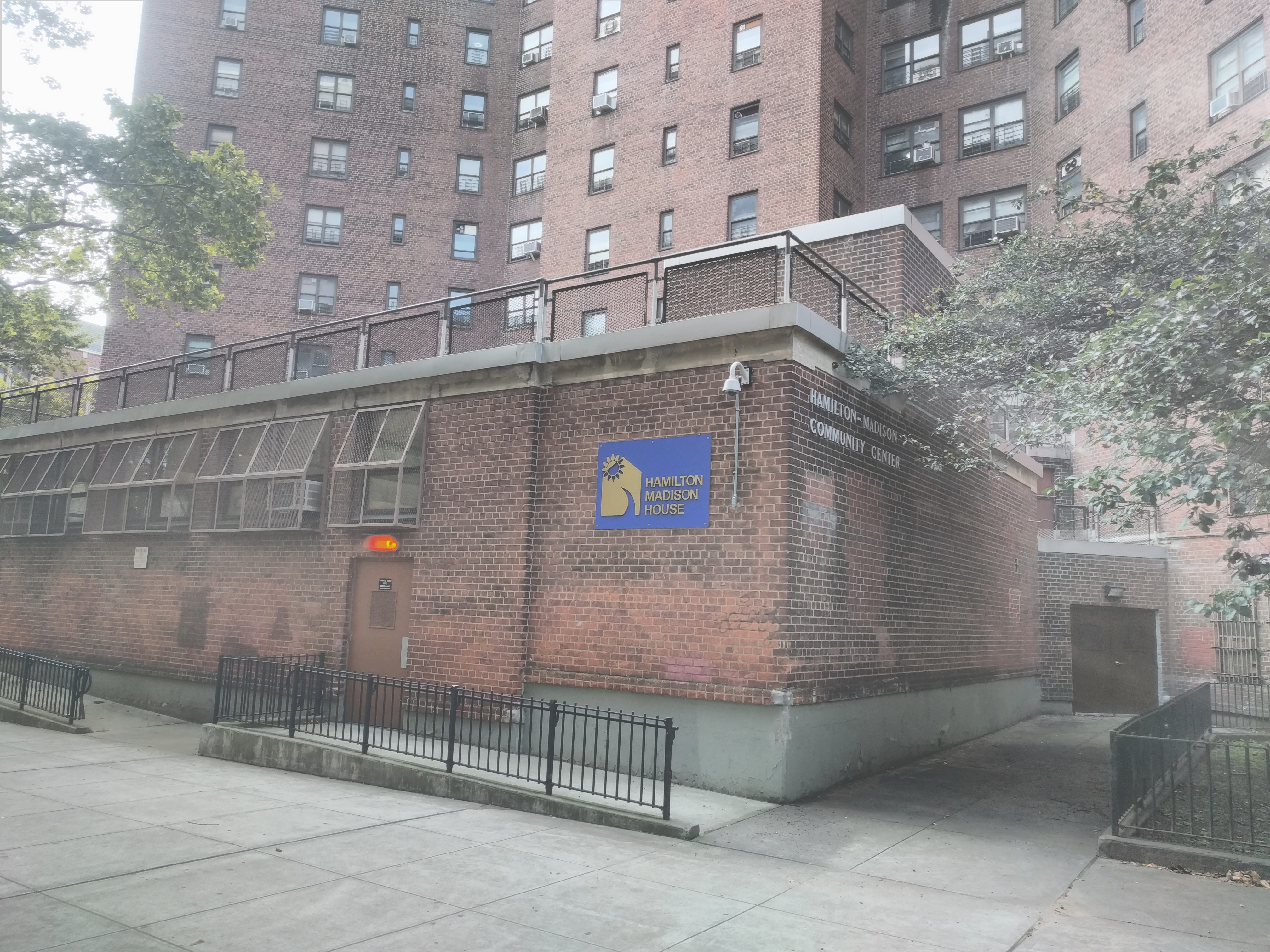 looking West